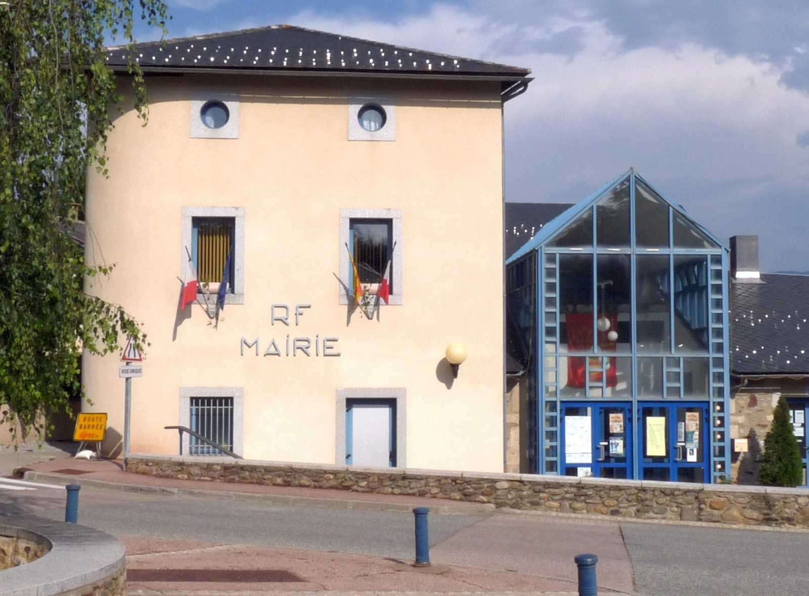 Mairie d'Ur, Pyrénées-Orientales, France